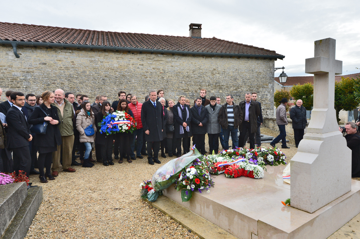 Nicolas Dupont-Aignan sur la tombe du Général de Gaulle le 9 novembre 2014 à Colombey